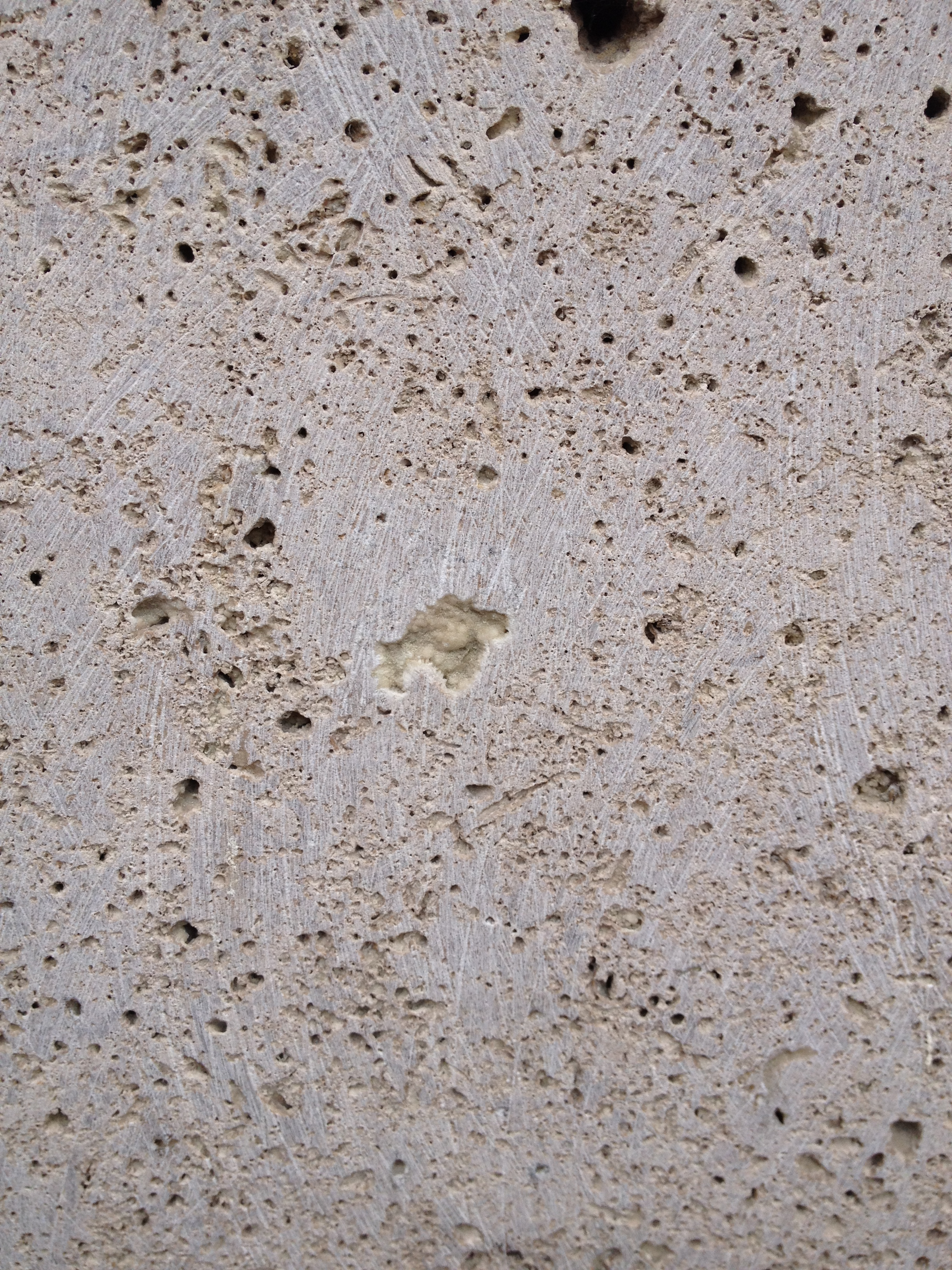 Gönninger Tuff, geschliffenes Muster ca. 25 x 18cm